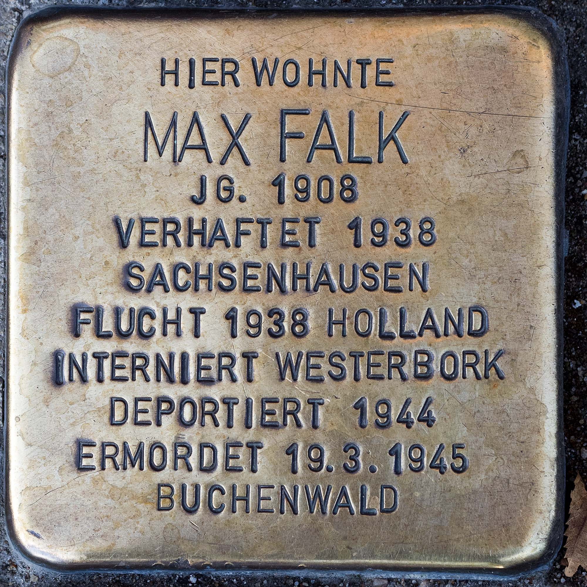 2016 Stolpersteine Toevo Max Falk